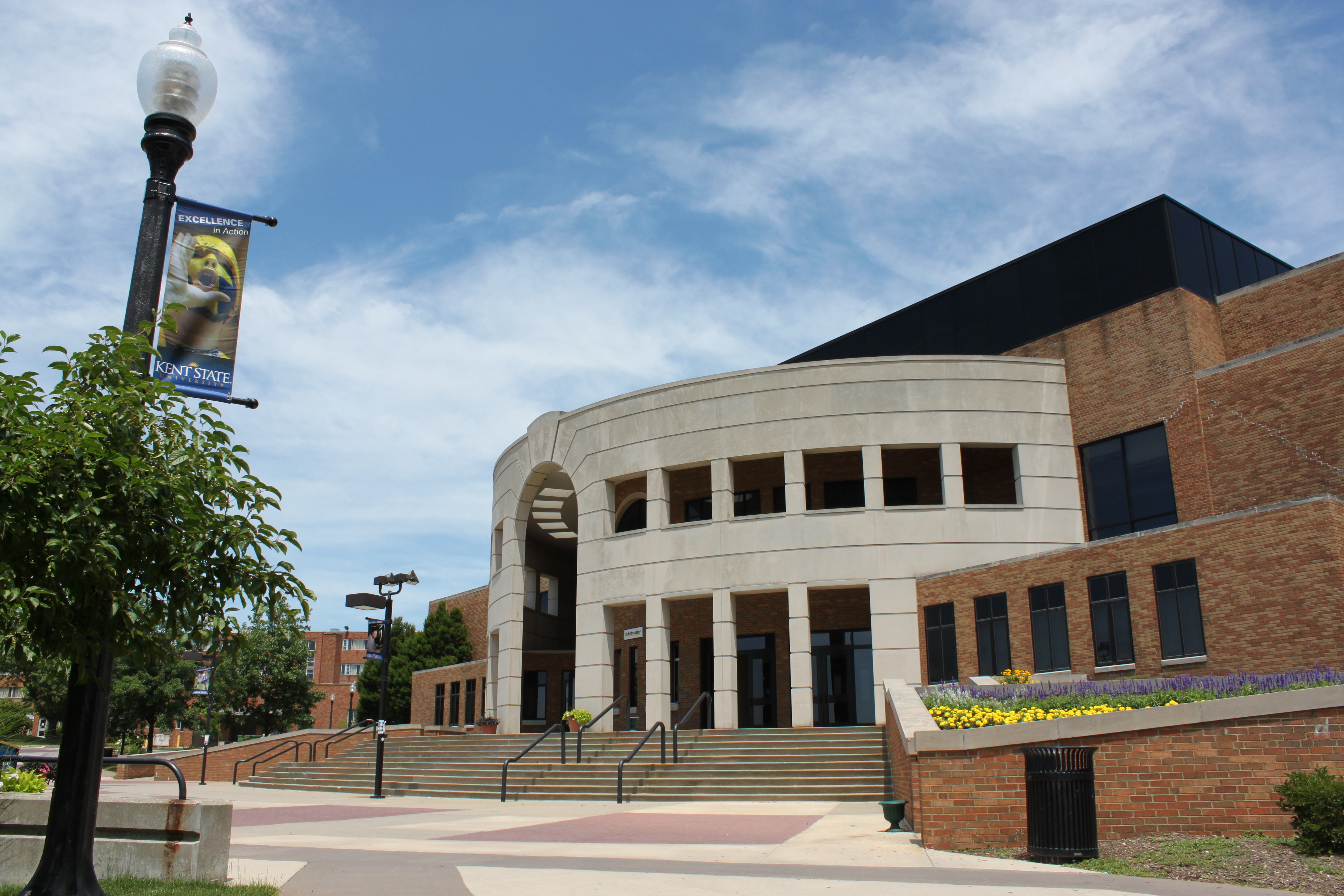 Kent State MACC